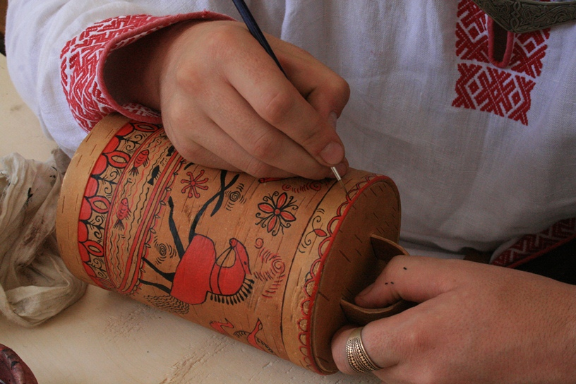 Mesenskaya Rospis auf Birkenleder-Tujes